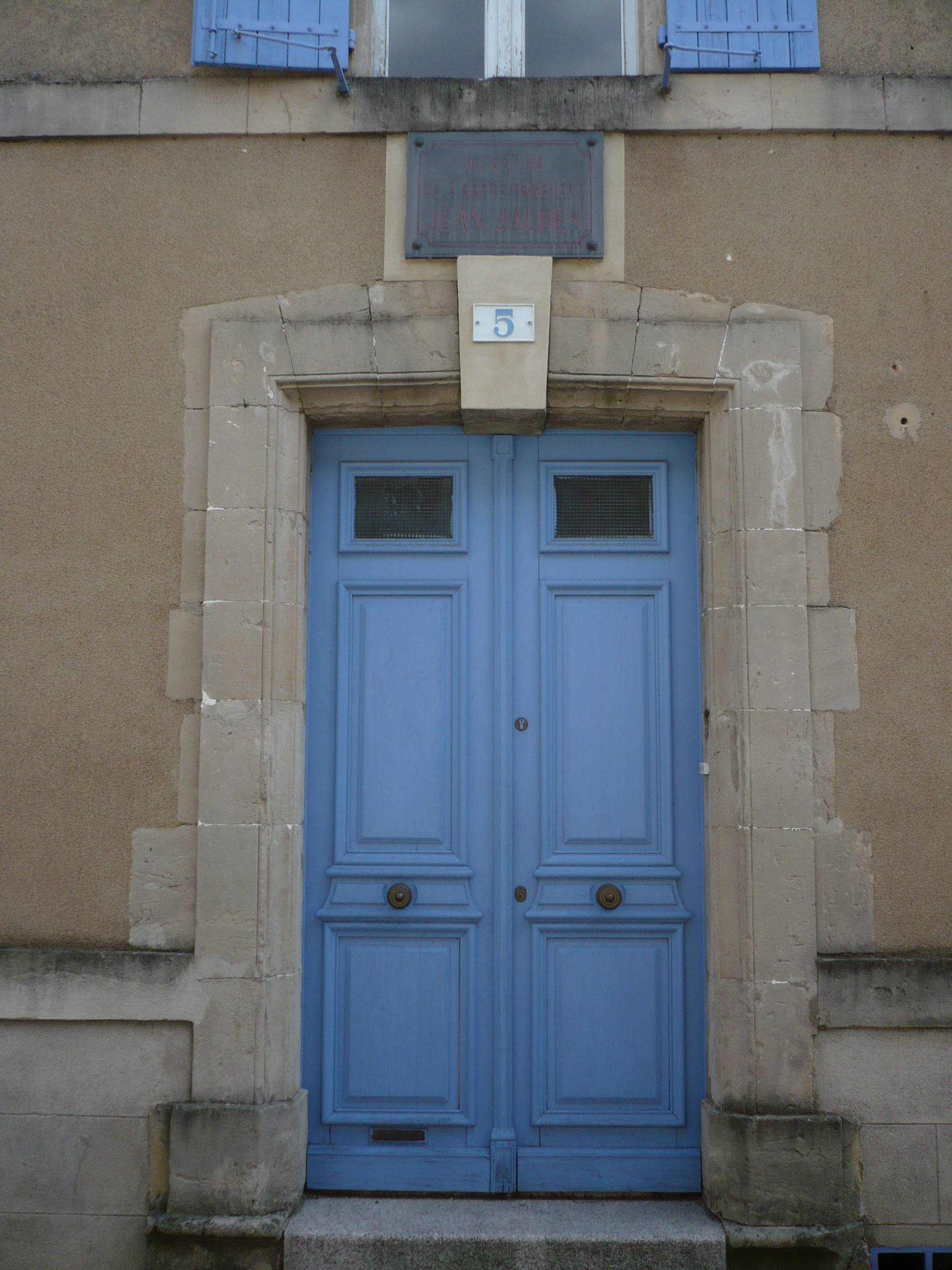 Entrée de la modeste demeure familiale des Jaurès à Castres dans le département français du Tarn.